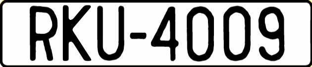 Украинский автомобильный номер времён фашистской оккупации, 1941-1942 года